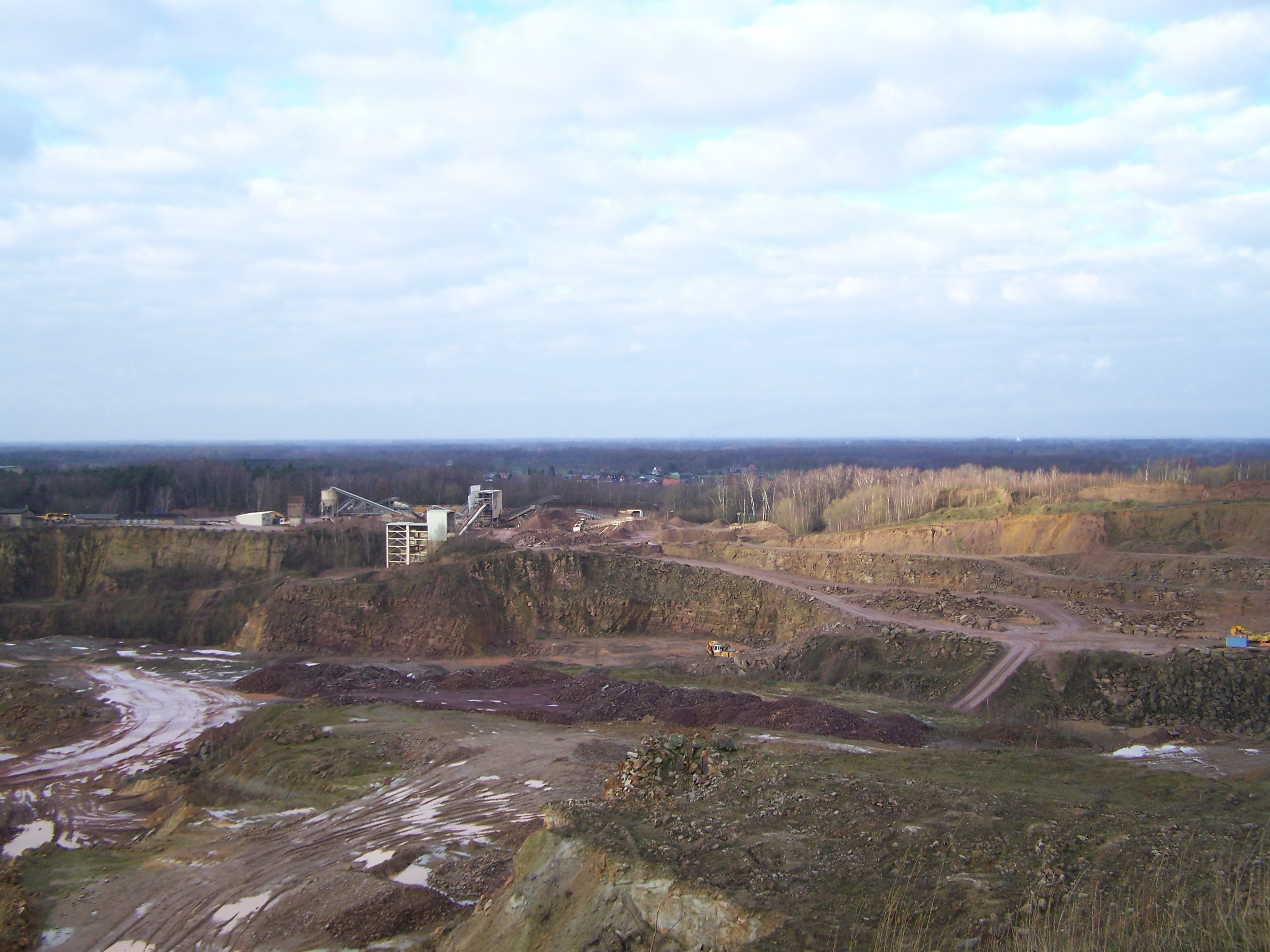 Blick vom Kälberberg in Obersteinbeck Richtung Nordwest in die Norddeutsche Tiefebene. Im Vordergrund Steinbruch auf Karbonsandstein.